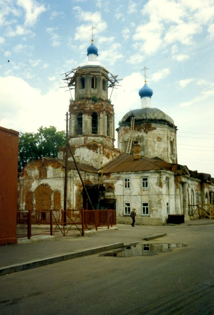 Церковь во имя чудотворной Тихвинской иконы Божией Матери в Казани во второй половине 1990-х годов.